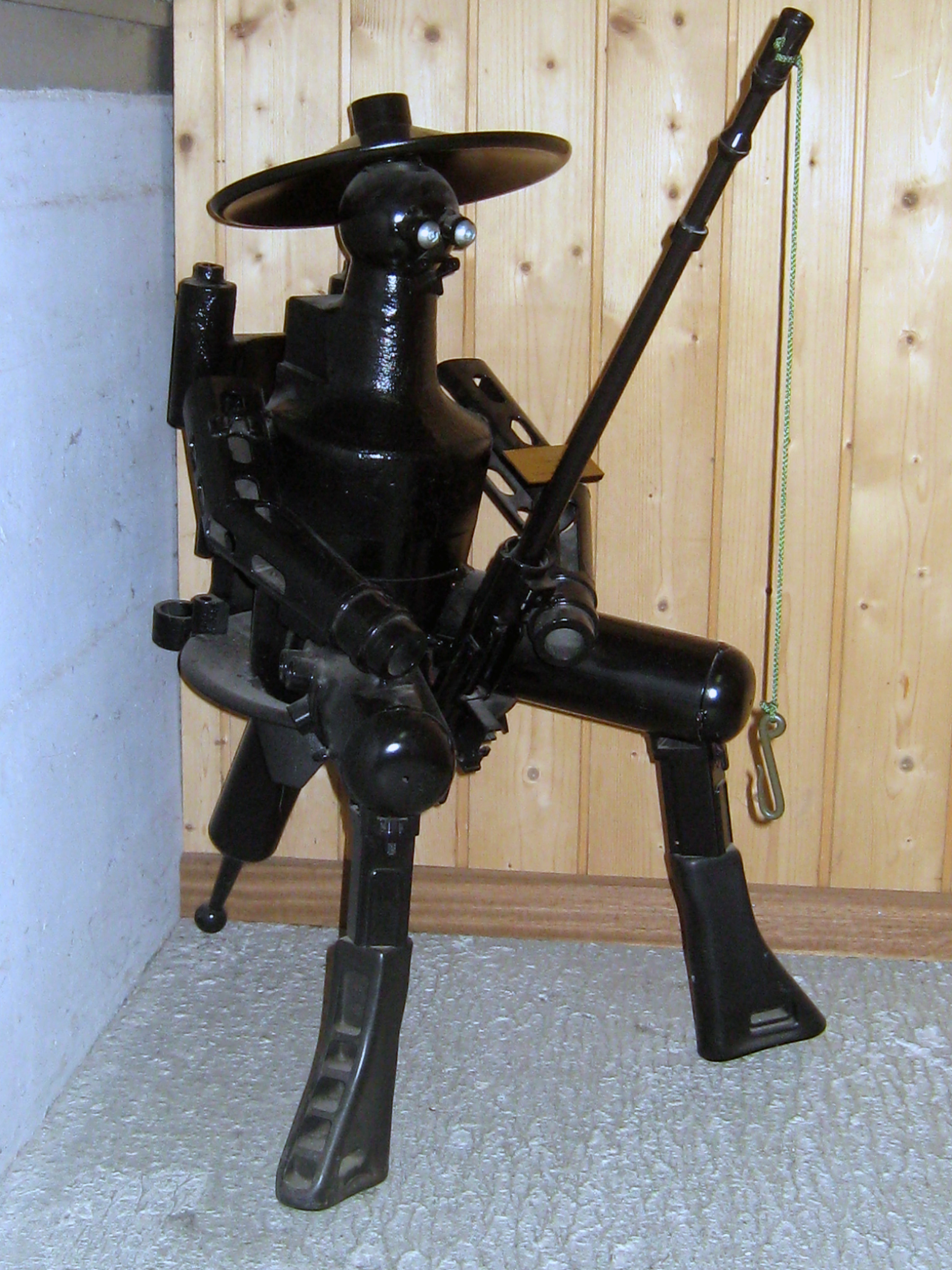 Fischerskulptur aus Stgw 57 - Pensionierungsgeschenk 1993 der W+F Bern, ausgestellt im Militärmuseum Full